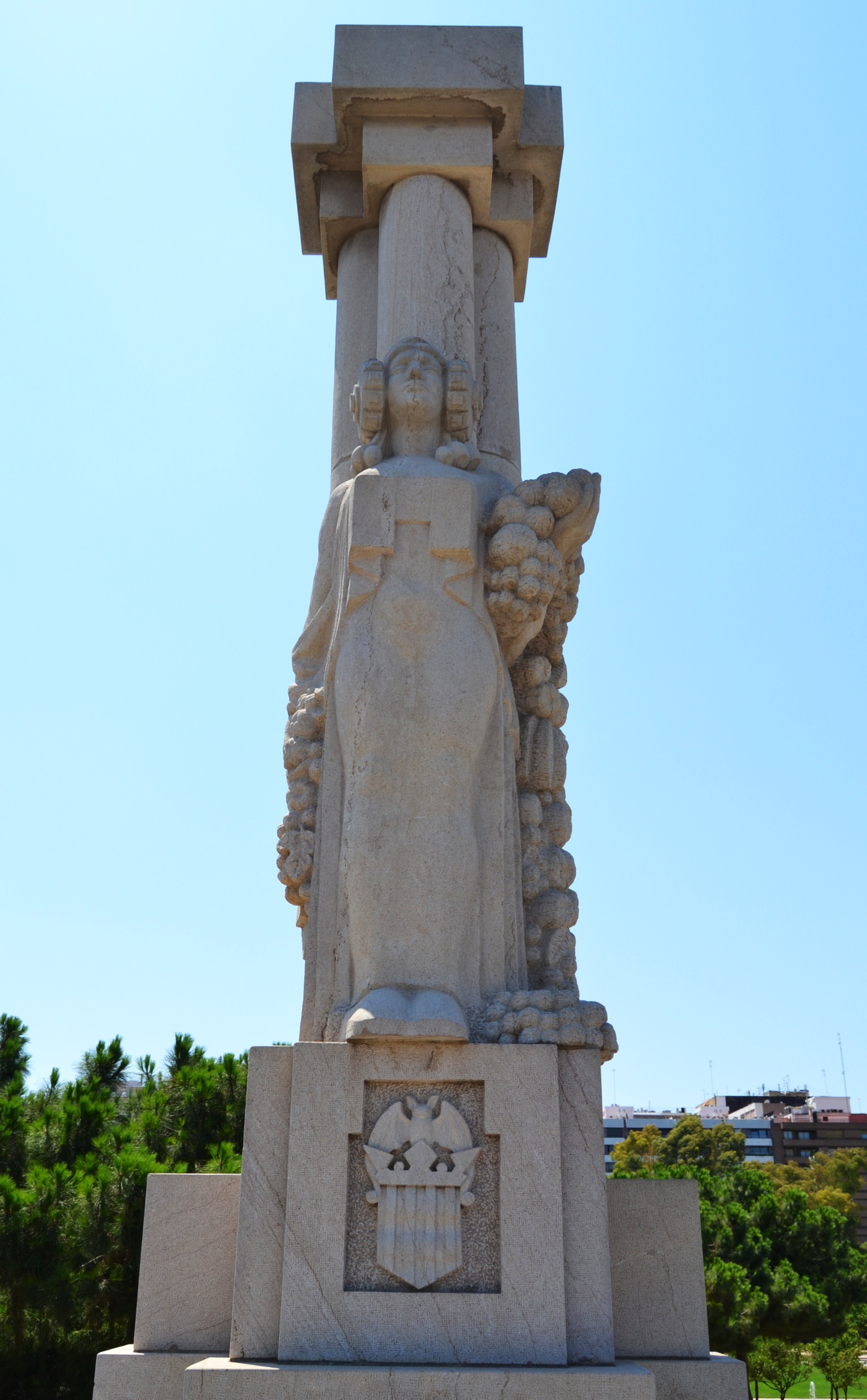 Estàtua del pont d'Aragó de València, al·legoria de València.